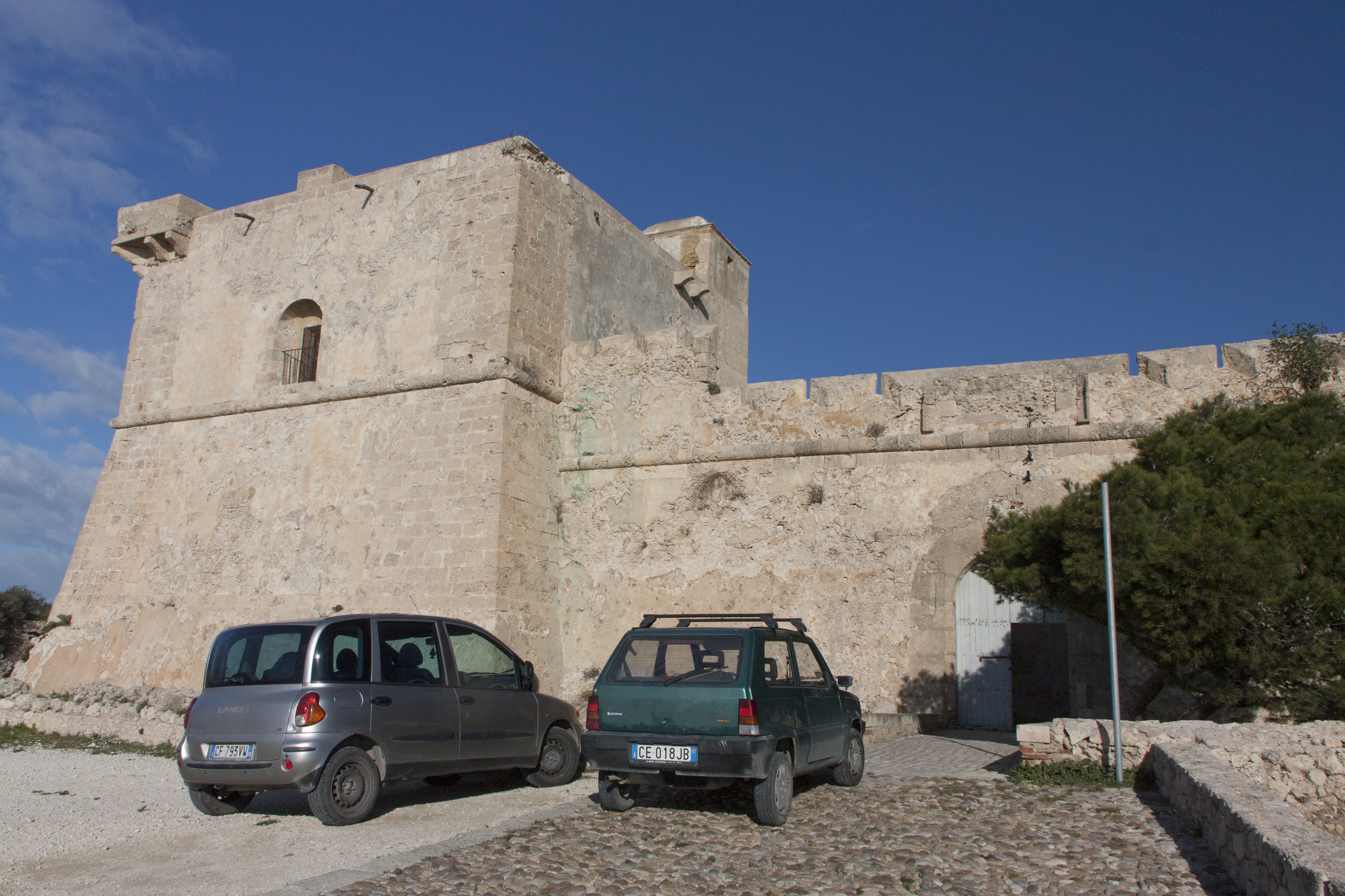 Castel Sant'Angelo (Licata)